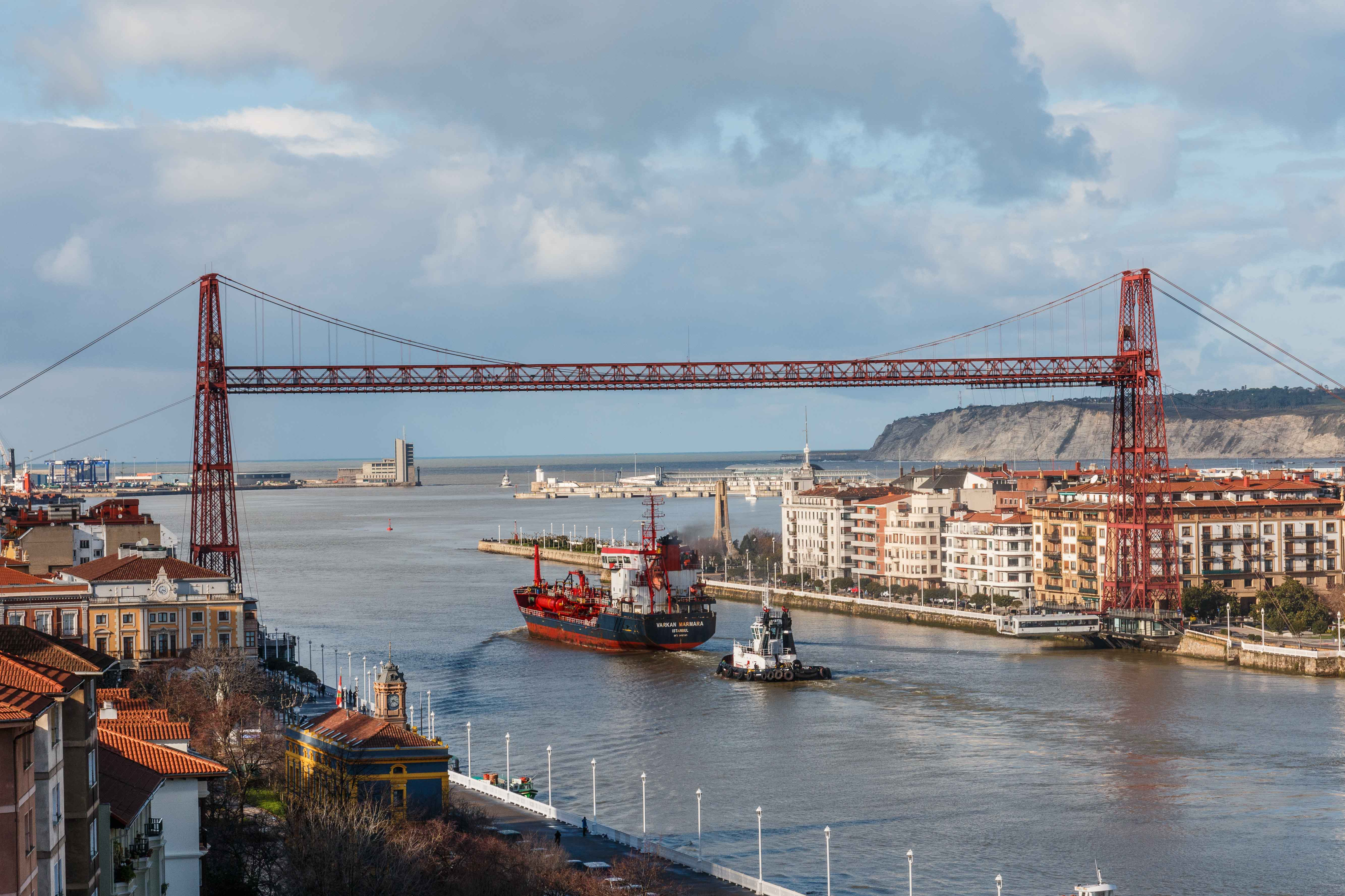 Bizkaia zubia